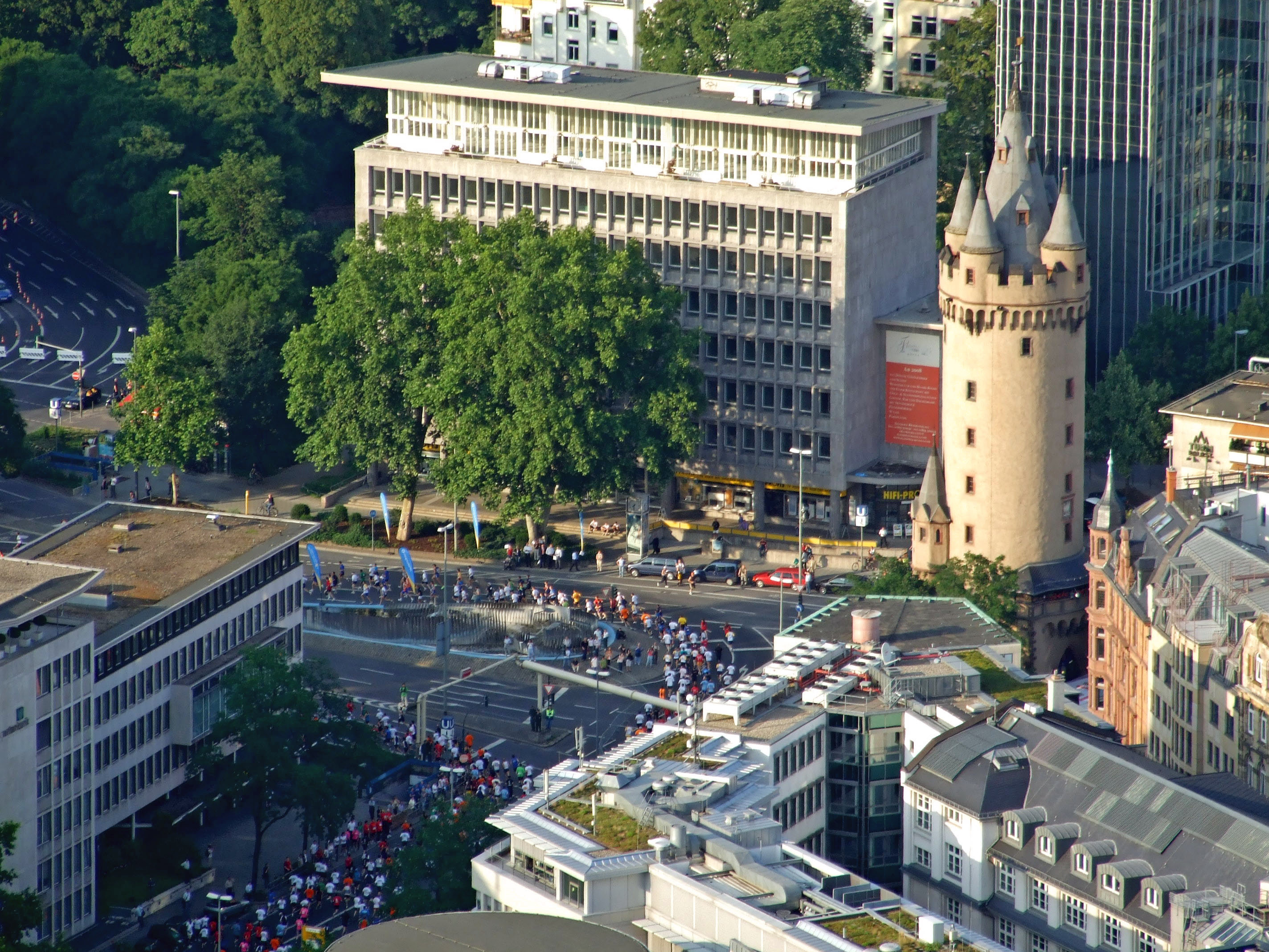 Vereinigung der beiden Startreihen (Eschenheimer Tor) beim JPMorgan Chase Corporate Challenge 2007 in Ffm